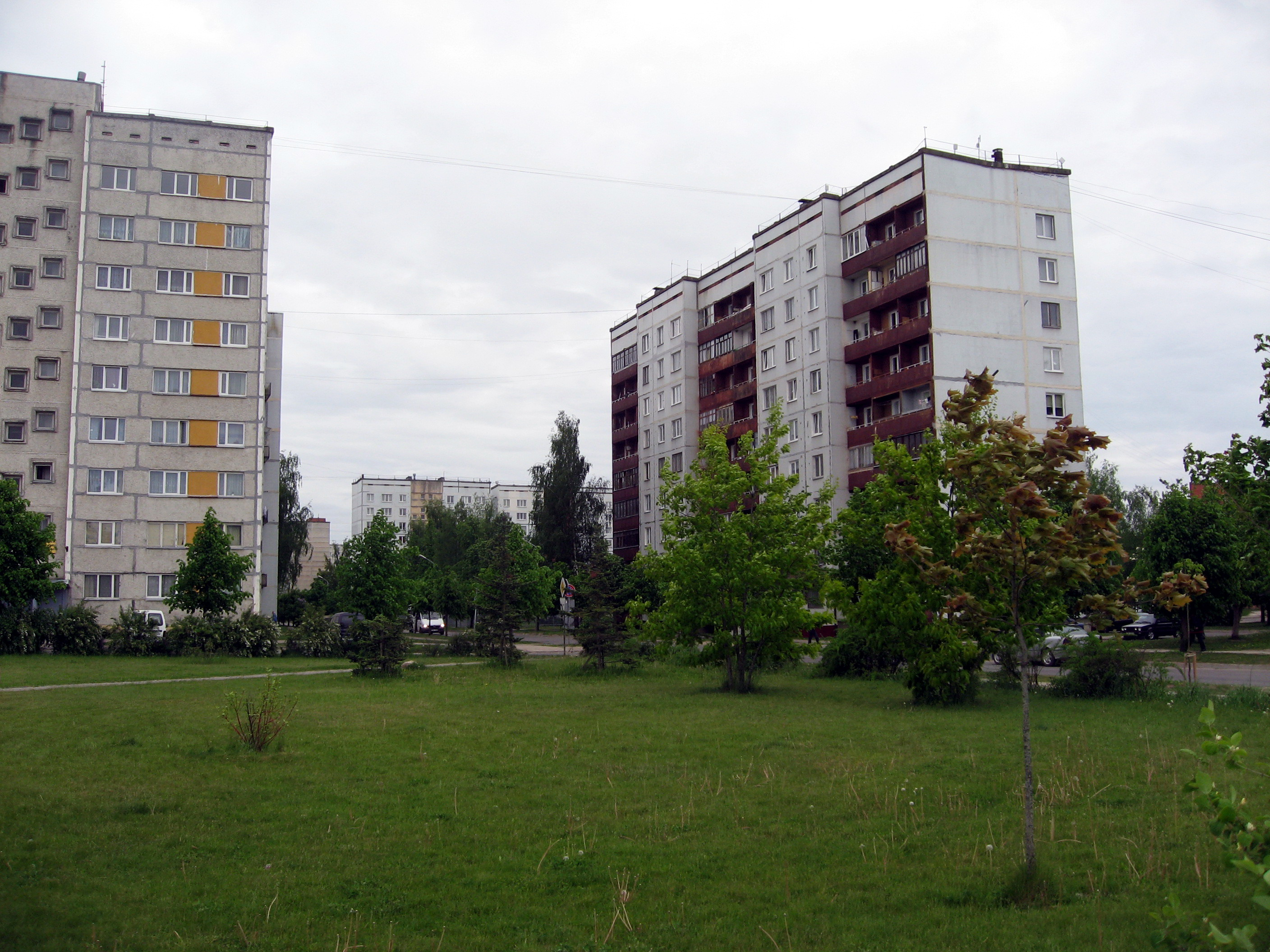 Salaspils, paneláky